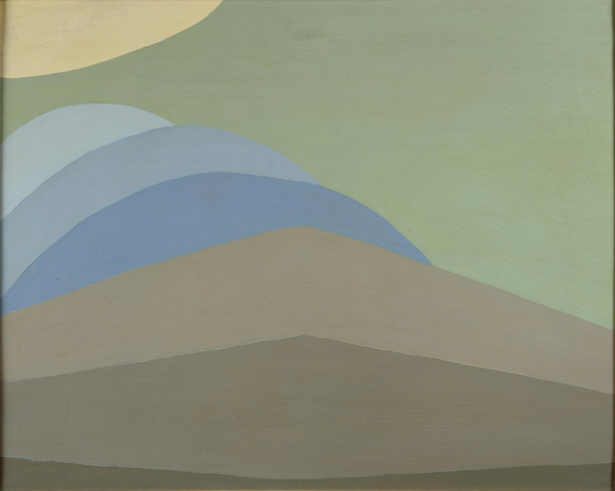 Landschap